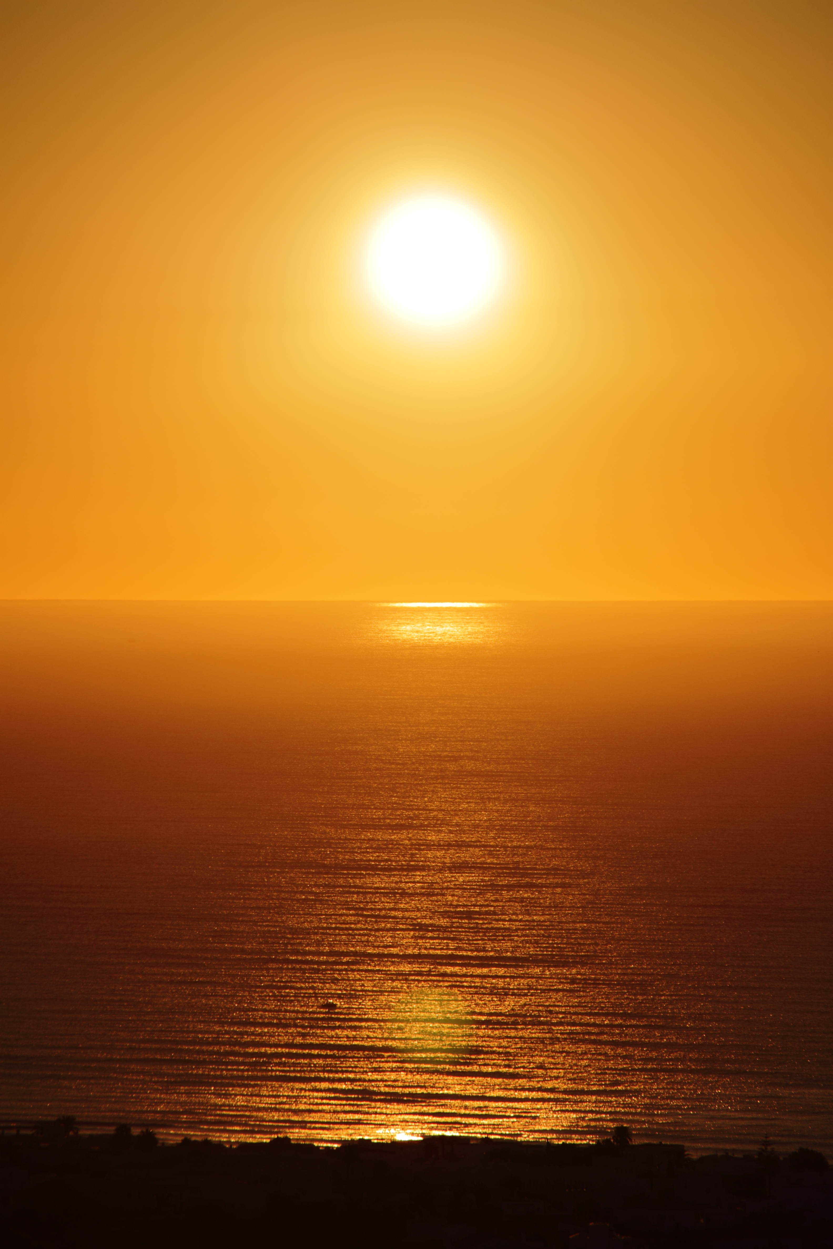 Sunrise, Mojar, Spain